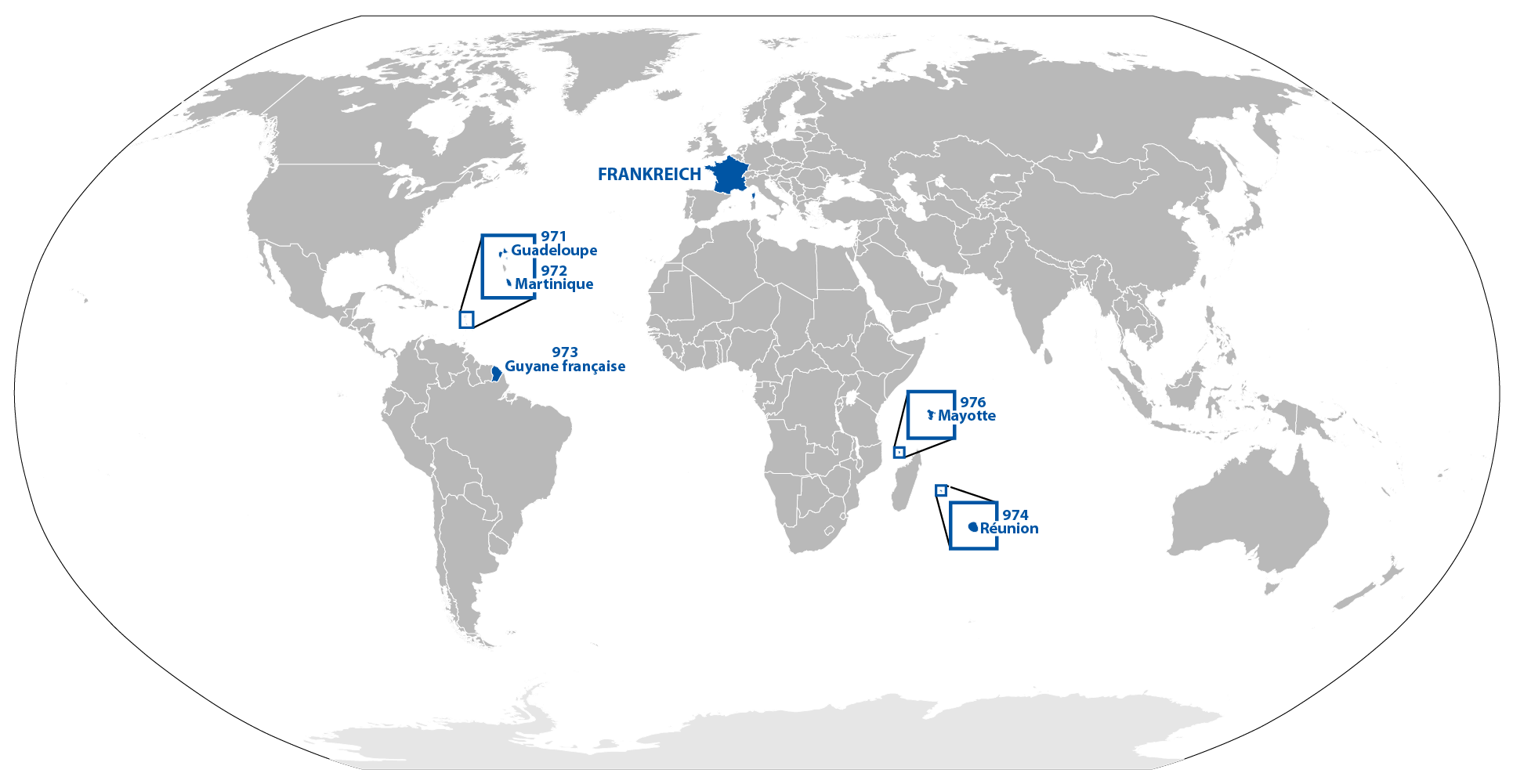 Karte der französischen Übersee-Départements